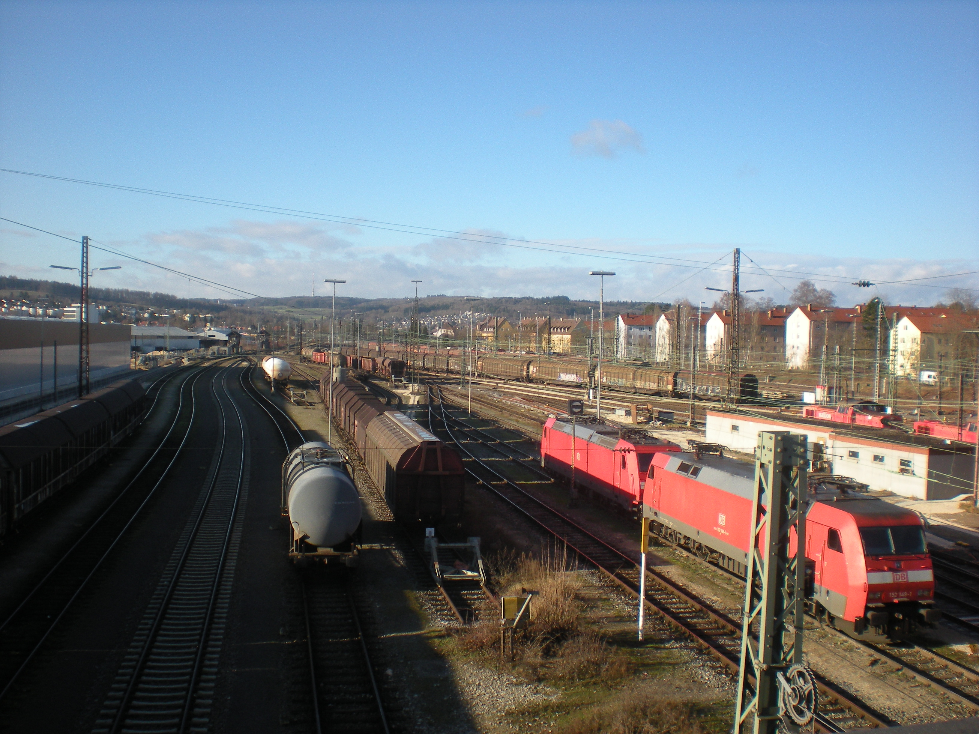 Gleisanlagen des Ulmer Rangierbahnhofs, von der Beringerbrücke aus gesehen, mit zwei Lokomotiven der Baureihe 152 und einigen Güterwagen